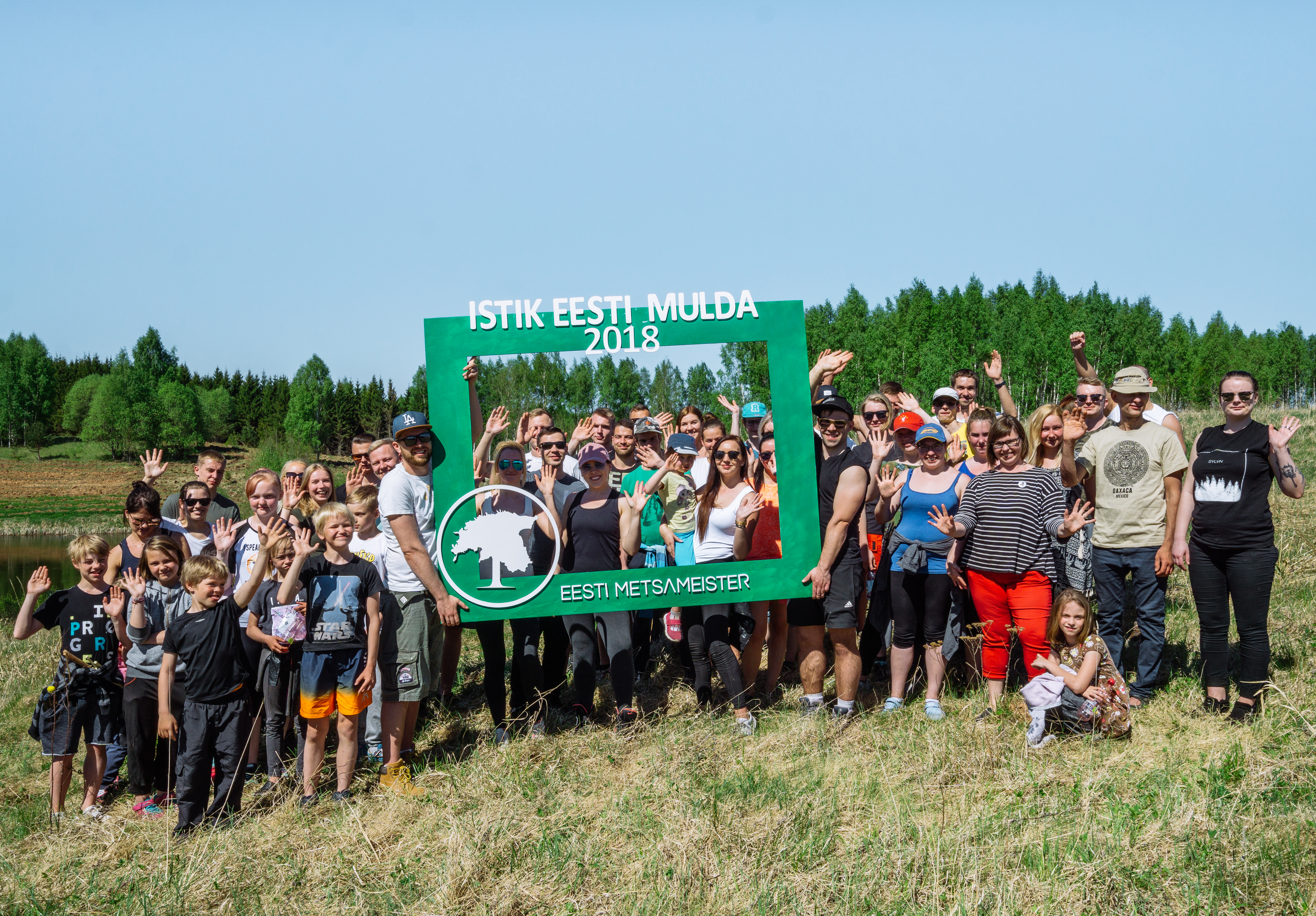 Eesti Metsameister OÜ heategevus üritus Laguja külas, Nõo vallas.